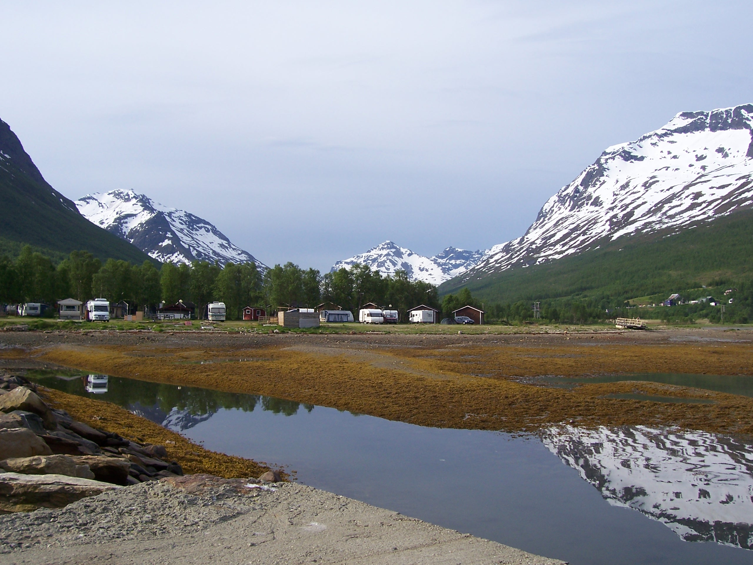 Sørbotn in the end of Ramfjorden near Tromsø